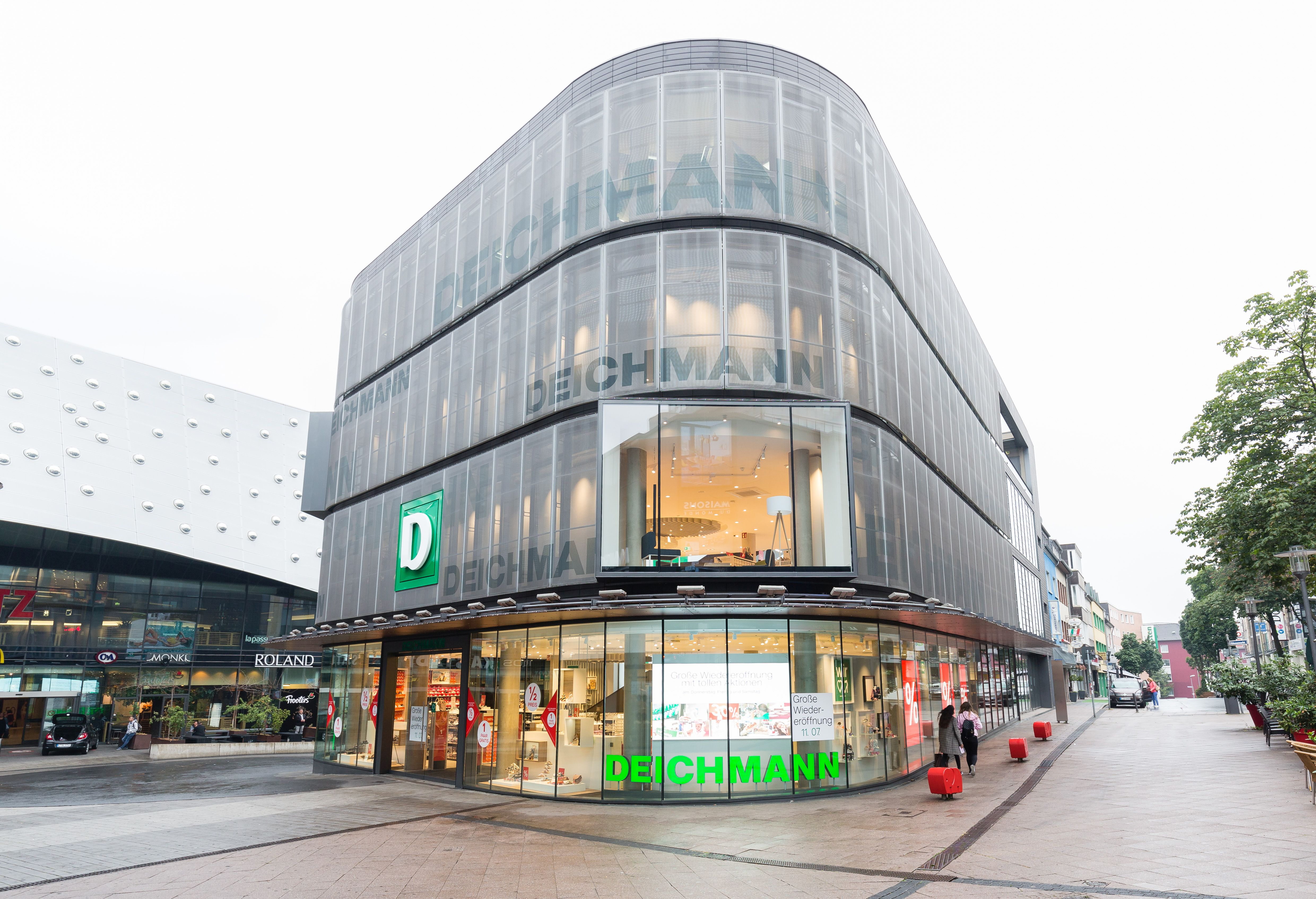 Deichmann-Filiale in Essen, Limbecker Platz